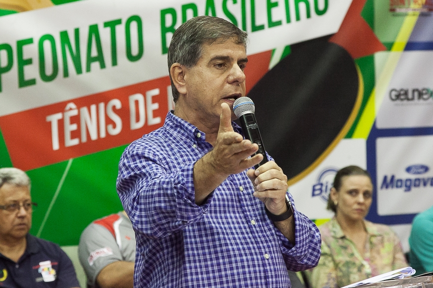 Alaor Azevedo - Presidente da CBTM